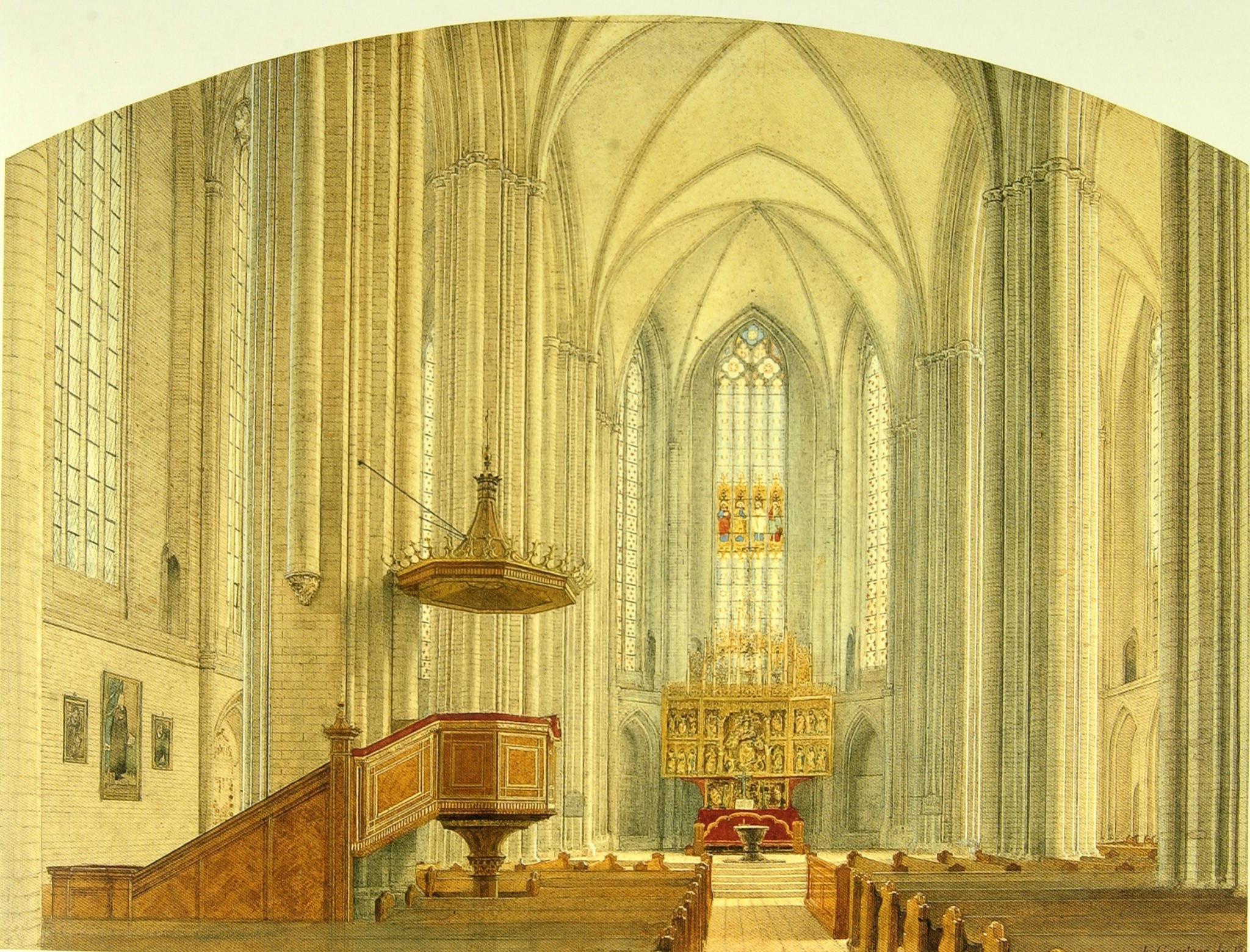 Innere der Marienkirche in Prenzlau. Aquarell. Stadtmuseum Berlin